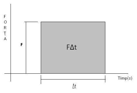 Aria patrulaterului reprezintă impulsul fortţei intr-un interval de timp t.